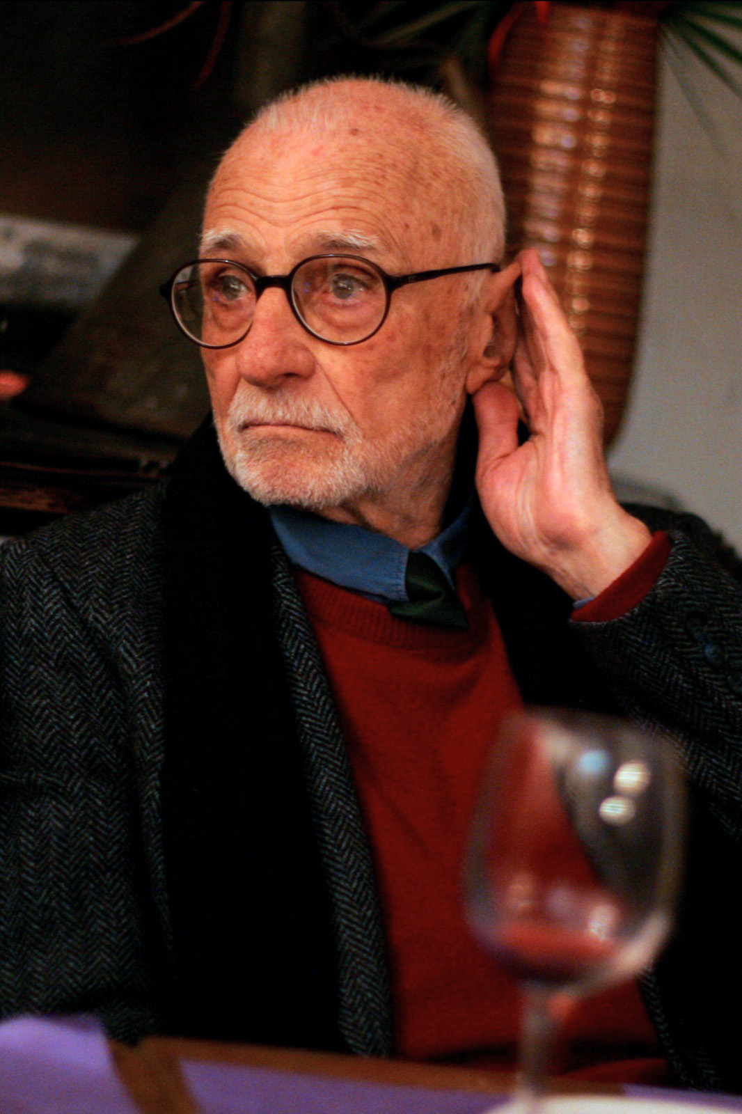 Mario Monicelli, regista.